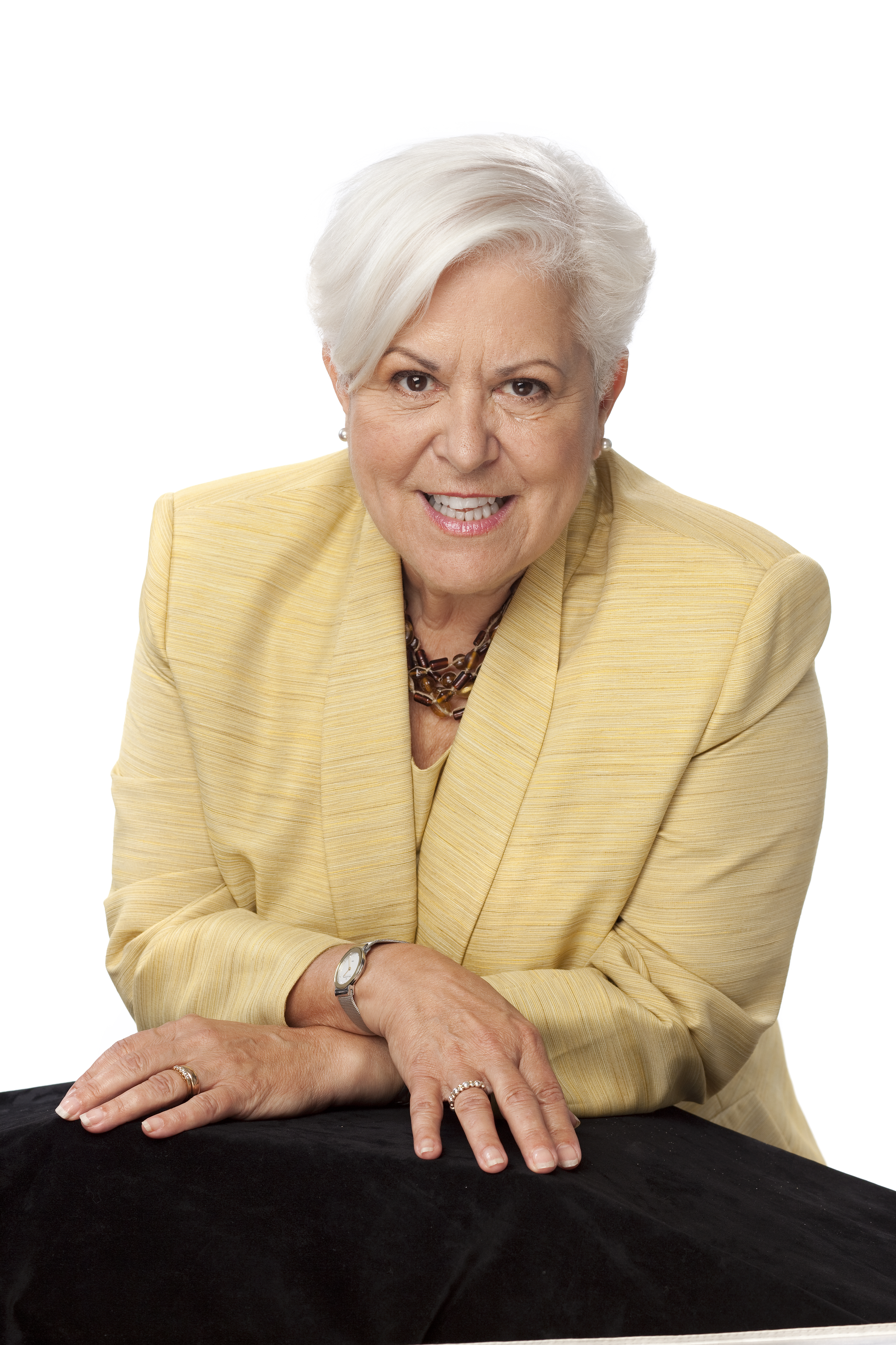 Photo officielle de Louise Harel, candidate à la mairie de Montréal et cheffe de Vision Montréal.